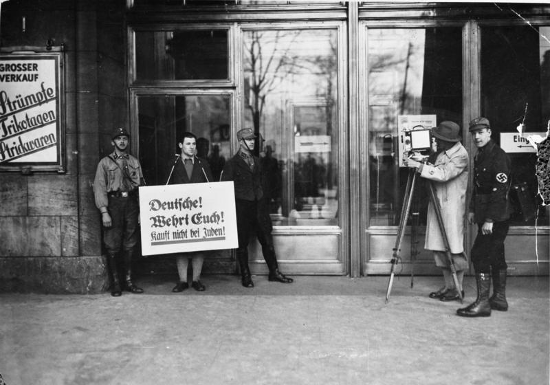 Berlin, Boykott jüdischer Geschäfte Zentralbild 1933 Boykottaktion der Nazis gegen jüdische Geschäfte, Berlin Filmleute warten auf Publikum, welches das Warenhaus betreten will (Wertheim). [Berlin.- Boykott jüdischer Geschäfte, SA- und SS-Leute vor Kaufhaus Wertheim, Mann mit Schild um den Hals "Deutsche! Wehrt Euch! Kauft nicht bei Juden!", rechts Mann mit Filmkamera filmend]